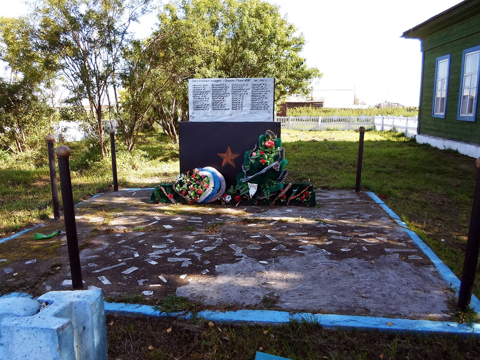 Мемориал Великой Отечественной войны в деревне Зерцалы. Ачинский район Красноярского края.